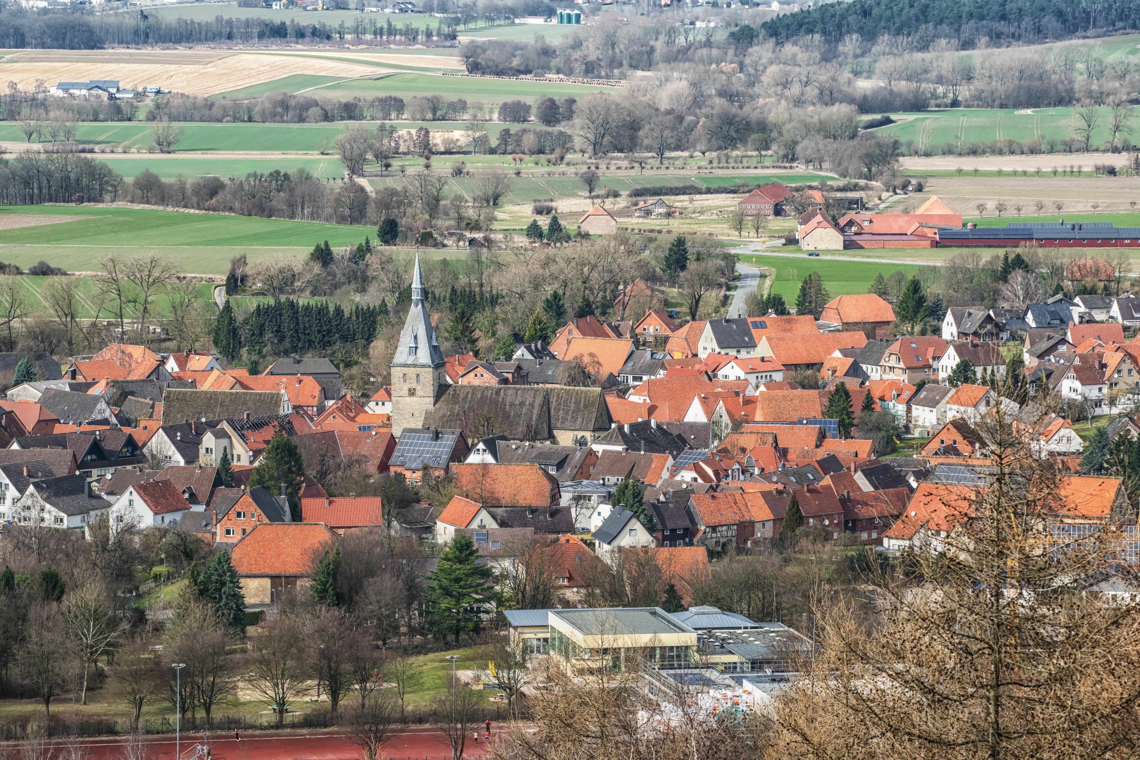 Blick auf Nieheim vom Holsterturm (Nieheimer Warte)